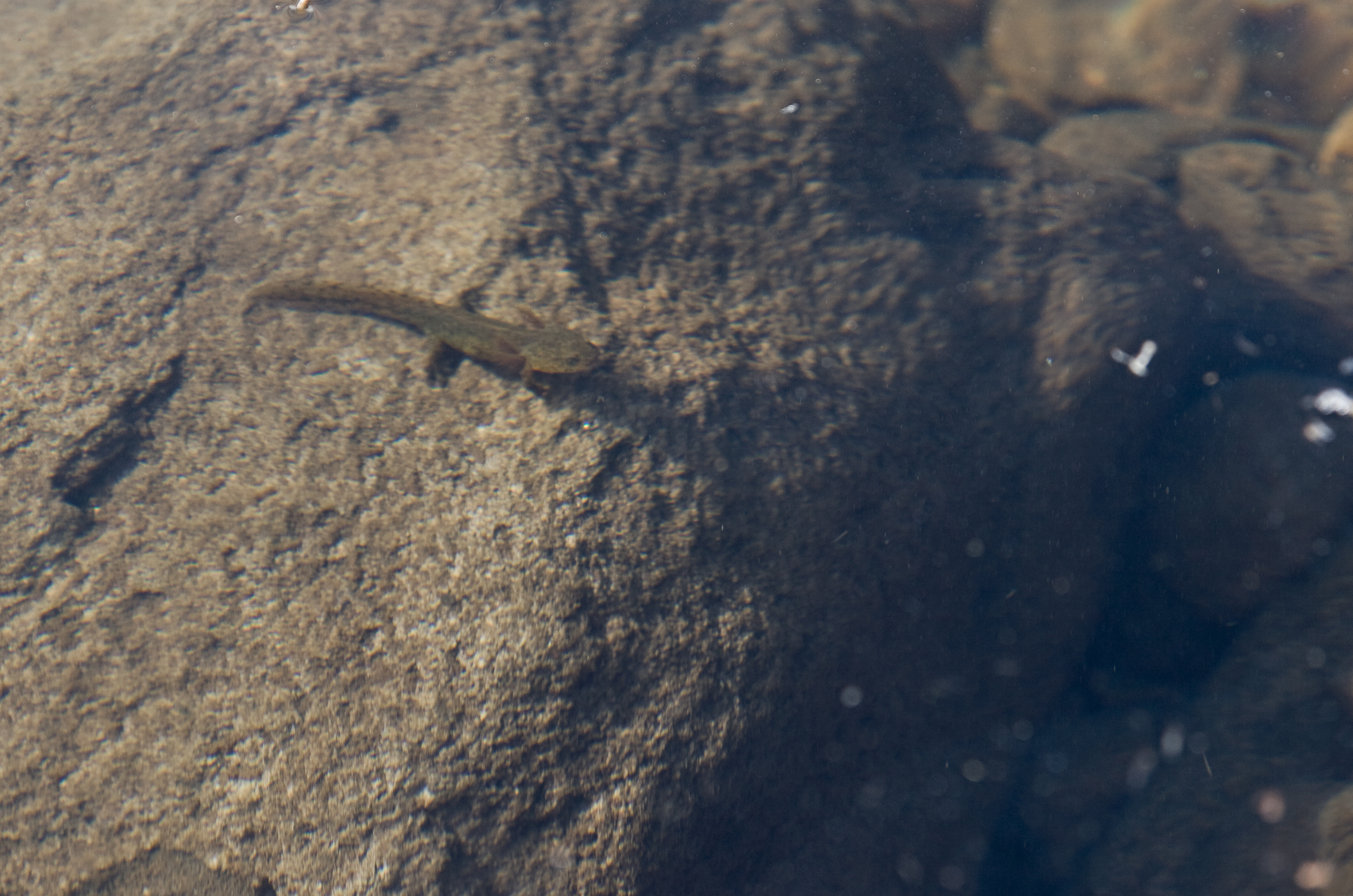 クロサンショウウオ (学名:Hynobius nigrescens)